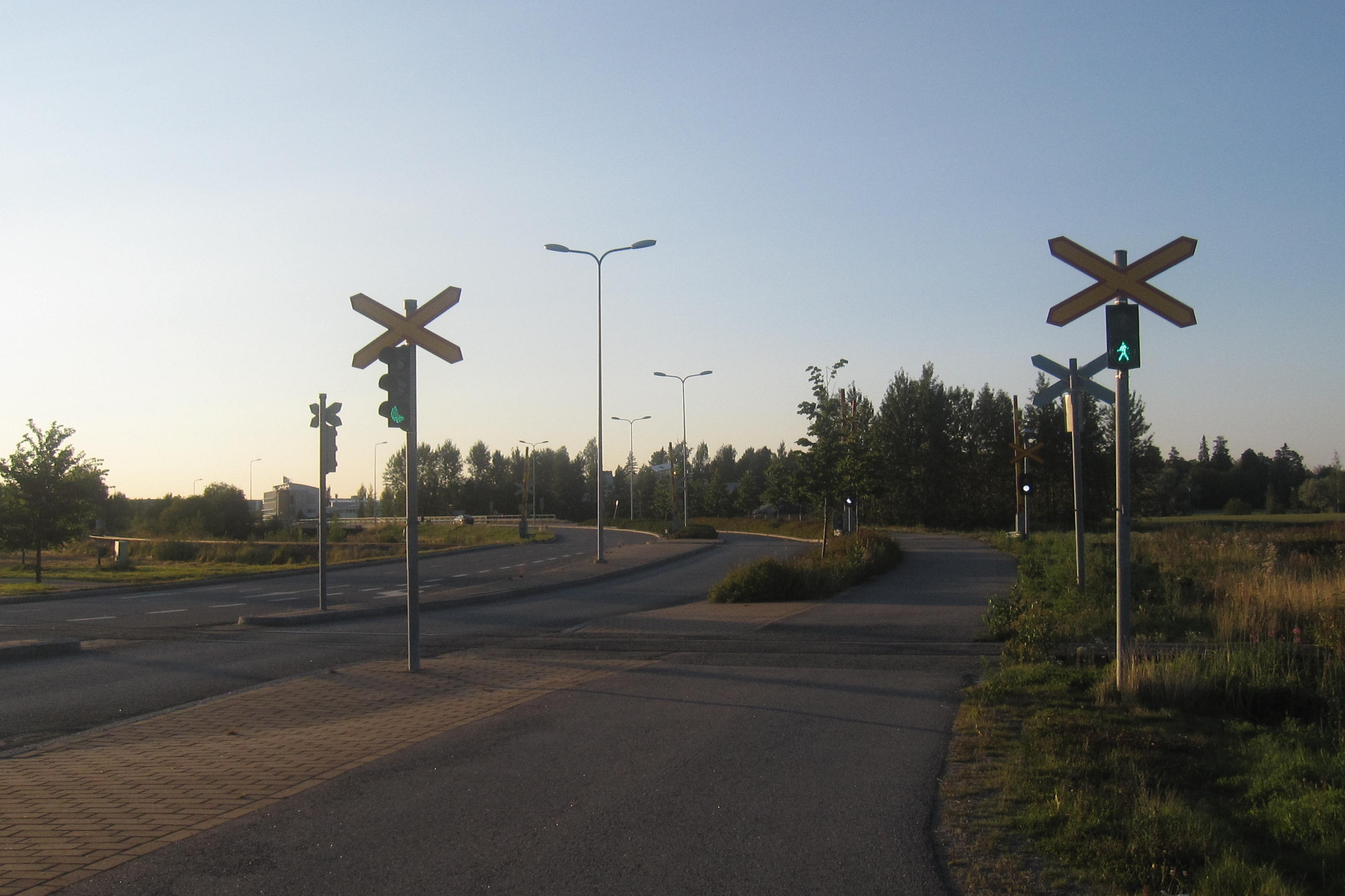 Taustalla Tikkurila–Hakkila-radan ja Jokiniementien tasoristeys. Etualalla maalitehtaan pistoraide ja tavalliset liikennevalot.